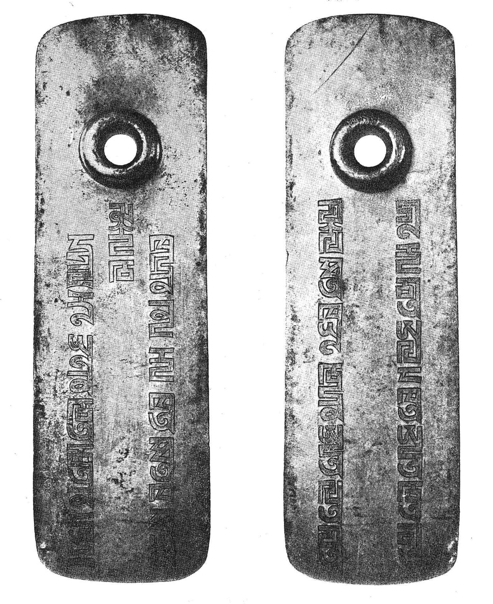 Минусинская пайцза. Найдена в Минусинском округе Енисейской губернии Российской империи в 1845 или 1846 году. Серебро; золочёная надпись по-монгольски квадратным письмом: «Силою вечного тенгри. Имя императора да будет свято. Тот, кто не будет относиться с благоговением, совершит проступок и умрёт» (Перевод Н. Н. Поппе. Квадратная письменность. — М.—Л.: Издательство АН СССР, 1941).